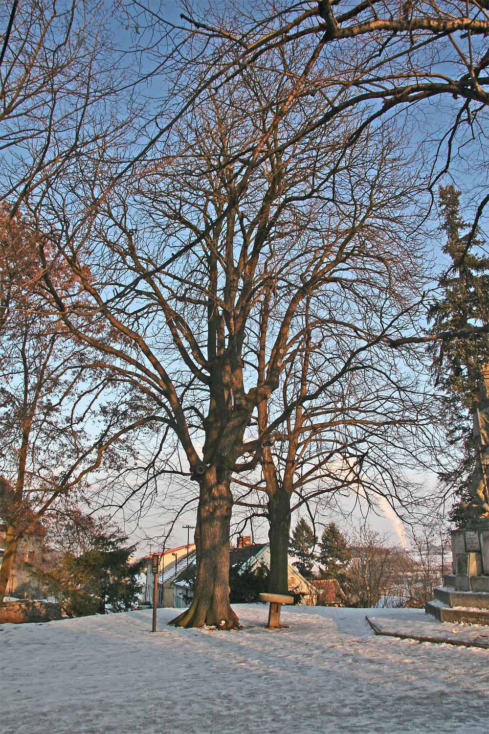 Melasův maďal v městečku Týnec nad Labem, okres Kolín